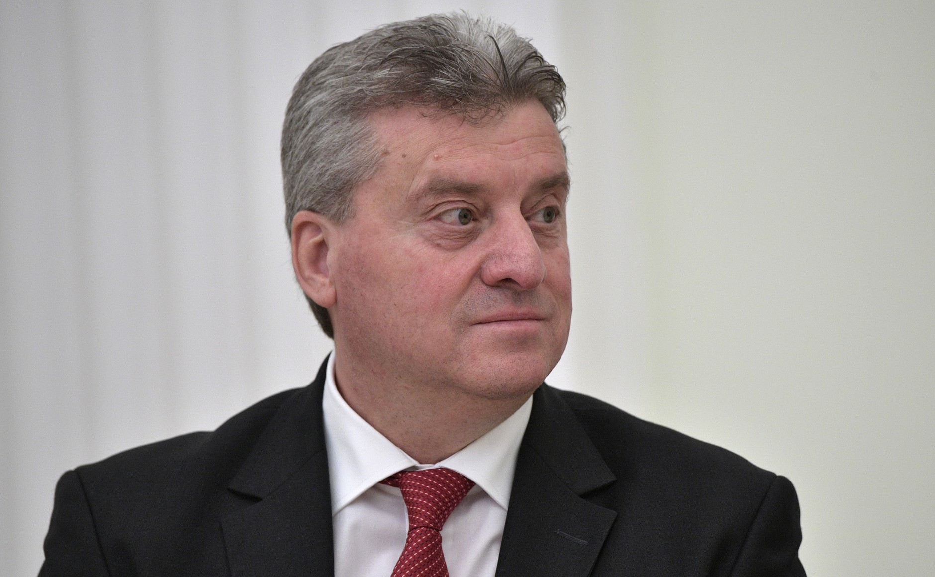 Президент Македонии Гёрге Иванов во время встречи с Президентом России Владимиром Путиным